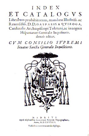 page titre